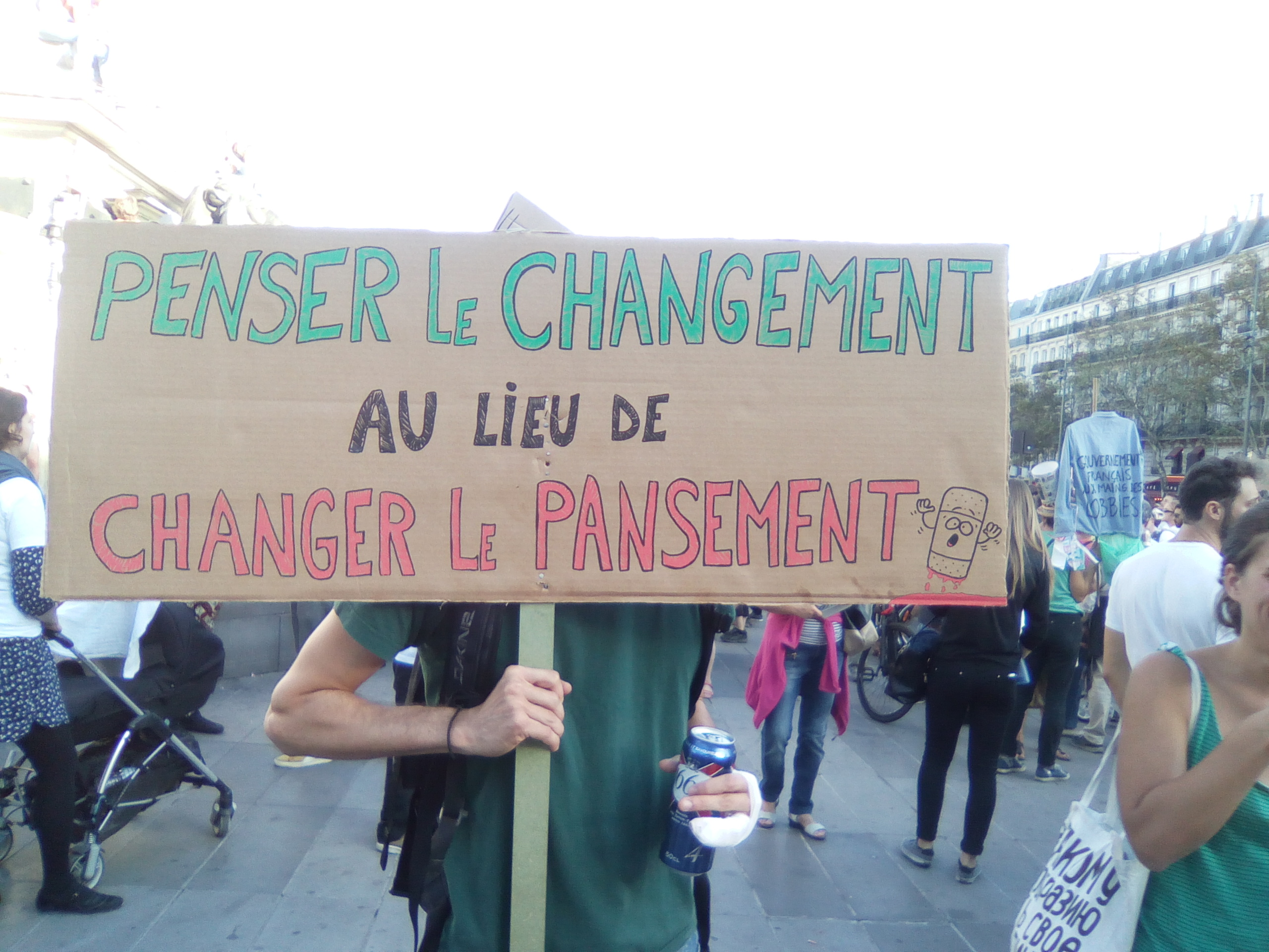 Pancarte « Penser le changement au lieu de changer le pansement ». Marche pour le climat à Paris (arrivée place de la République).